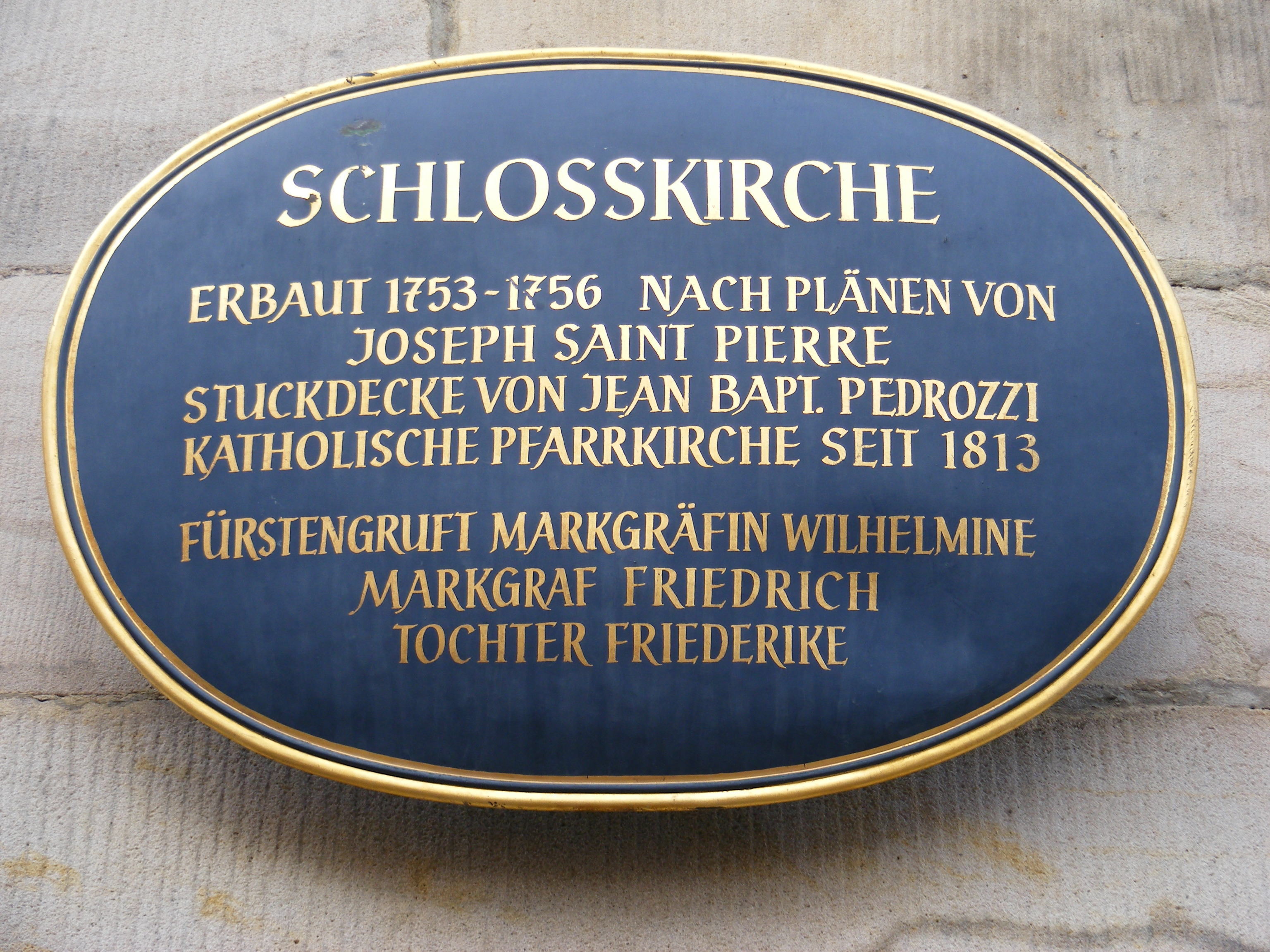 Bayreuth - Schlosskirche (Schild an der Fassade)